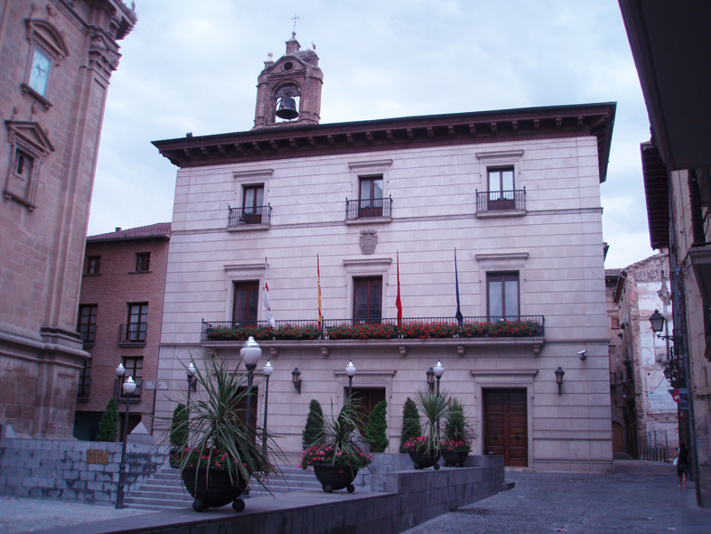 Fachada principal del Ayuntamiento de Tudela de la Plaza Vieja, en 2007.